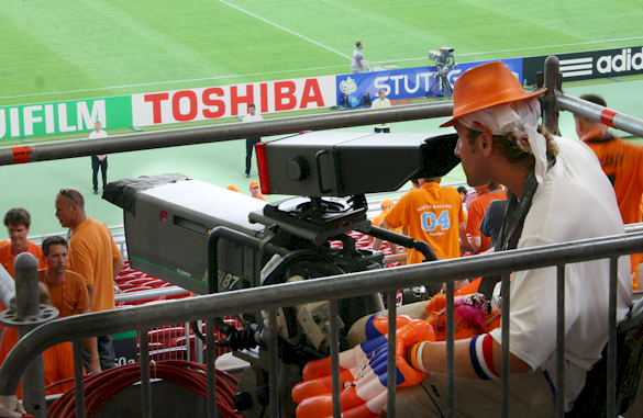 Cameraman lors de la Coupe du monde de football 2006 en Allemagne.